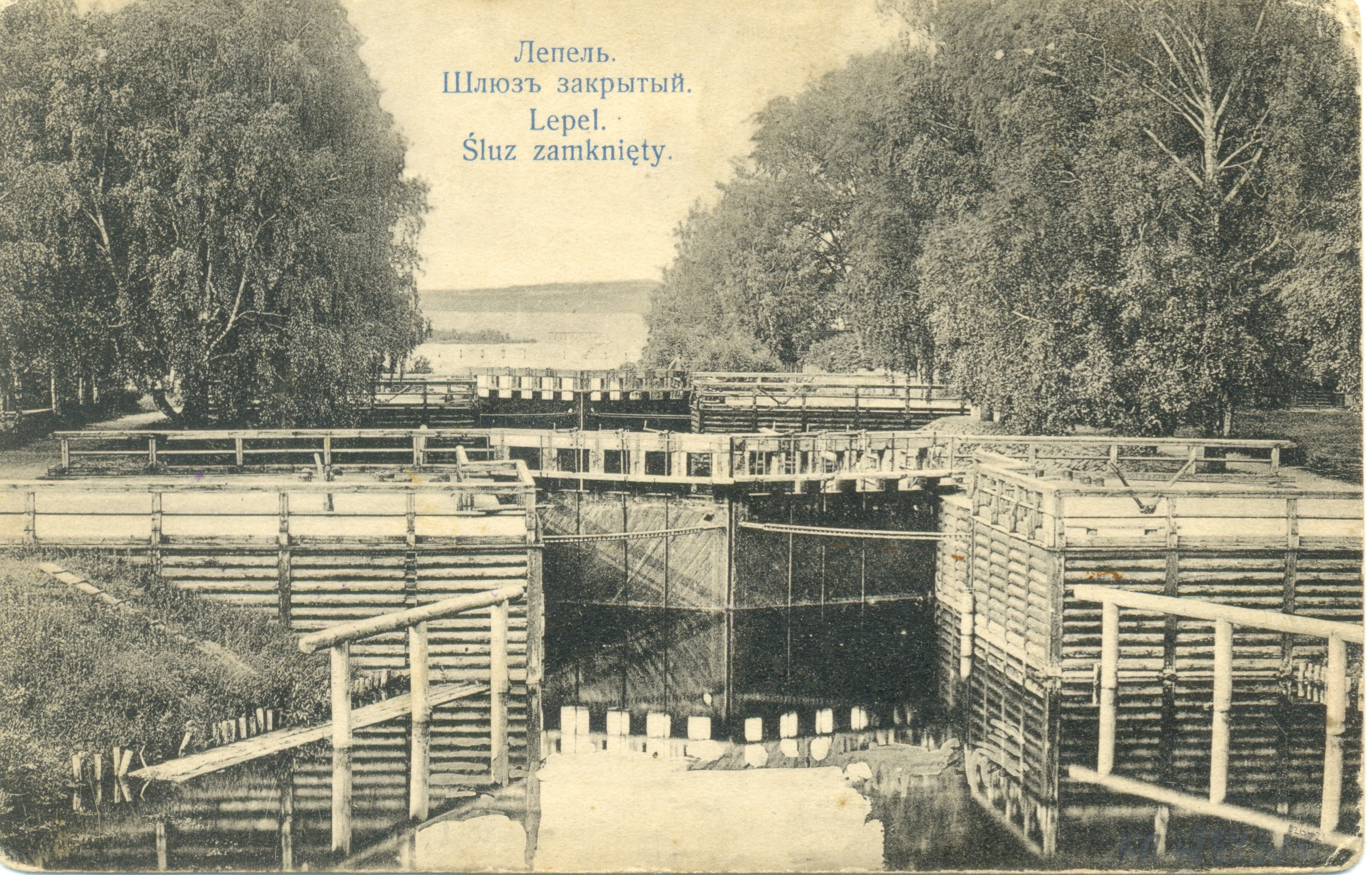 Беларуская (тарашкевіца): Лепель (Lepiel). Шлюз Бярэзінскай воднай сыстэмы (Biarezinskaja).